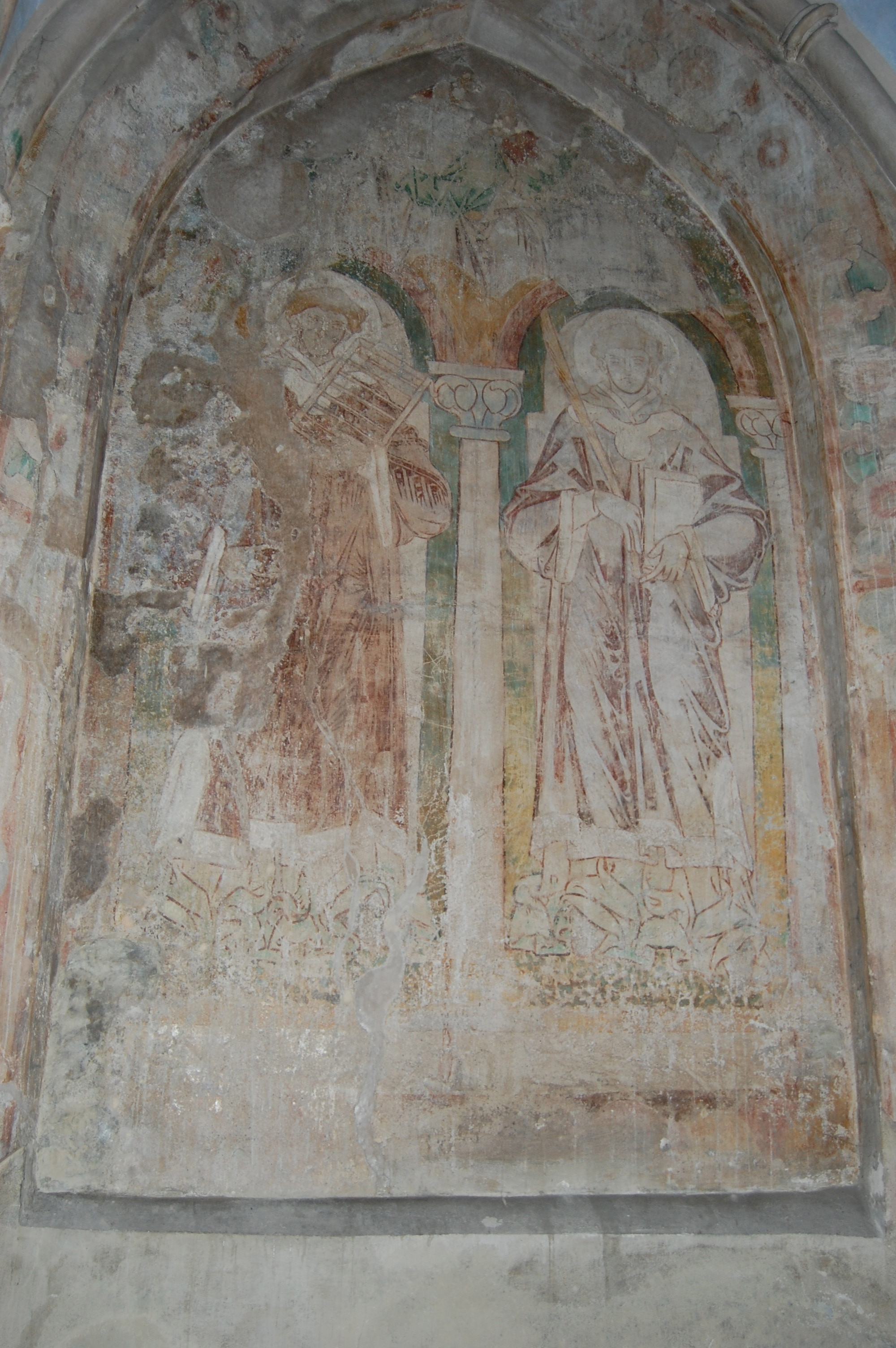 Fresko Rheinischer Zackenstil um1250